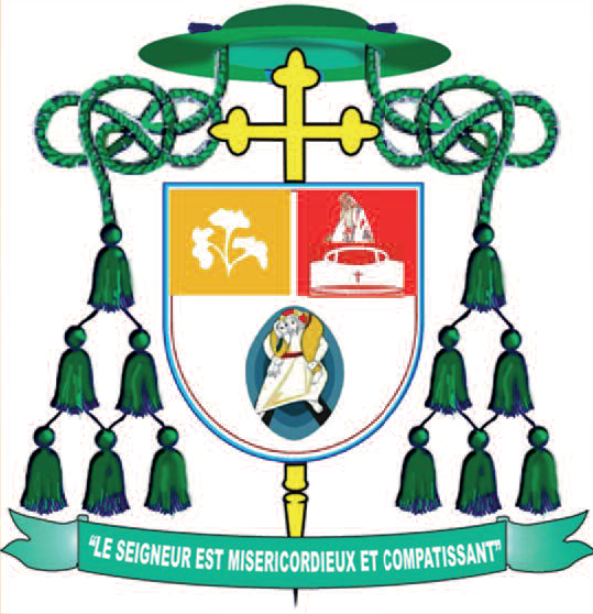 Armoiries